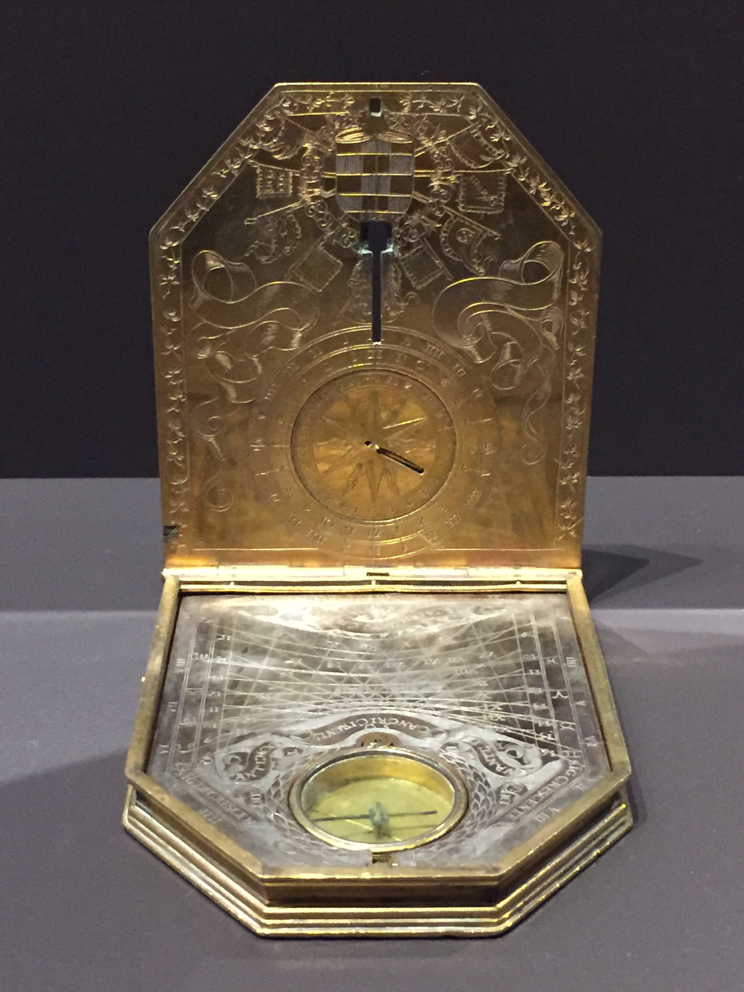 Reloj de sol horizontal decorado con el escudo de Fernando Álvarez de Toledo y Pimentel, III duque de Alba. Realizado por Ulrich Schniep en Munich en 1548. Museo Arqueológico Nacional, Madrid.